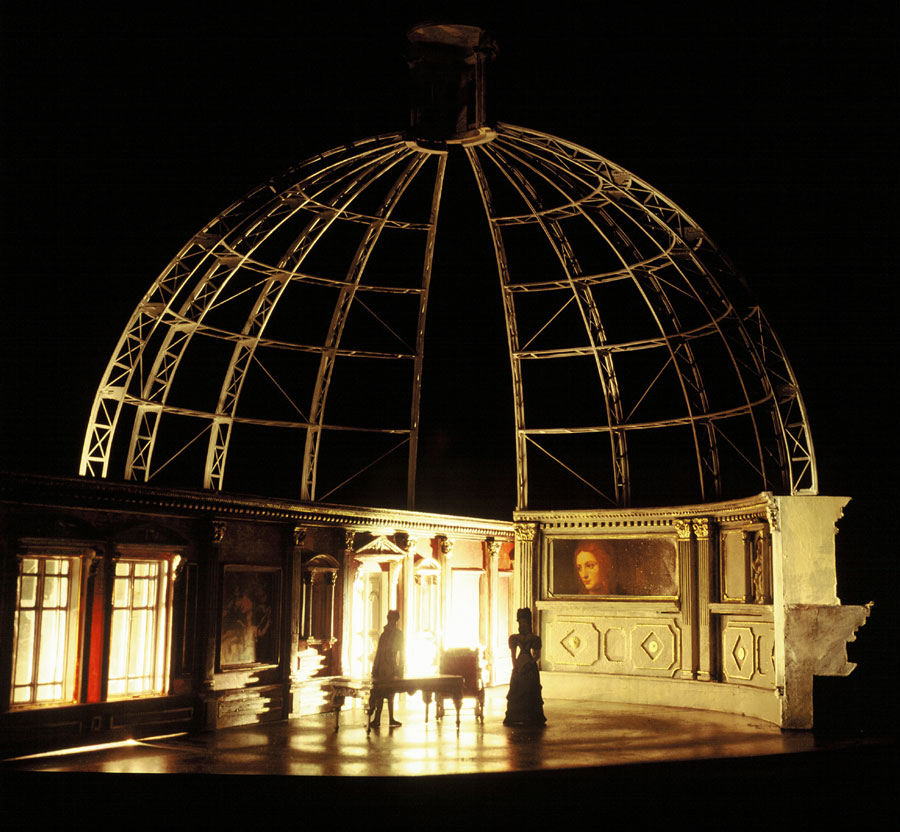 האופרה טוסקה, האופרה הישראלית